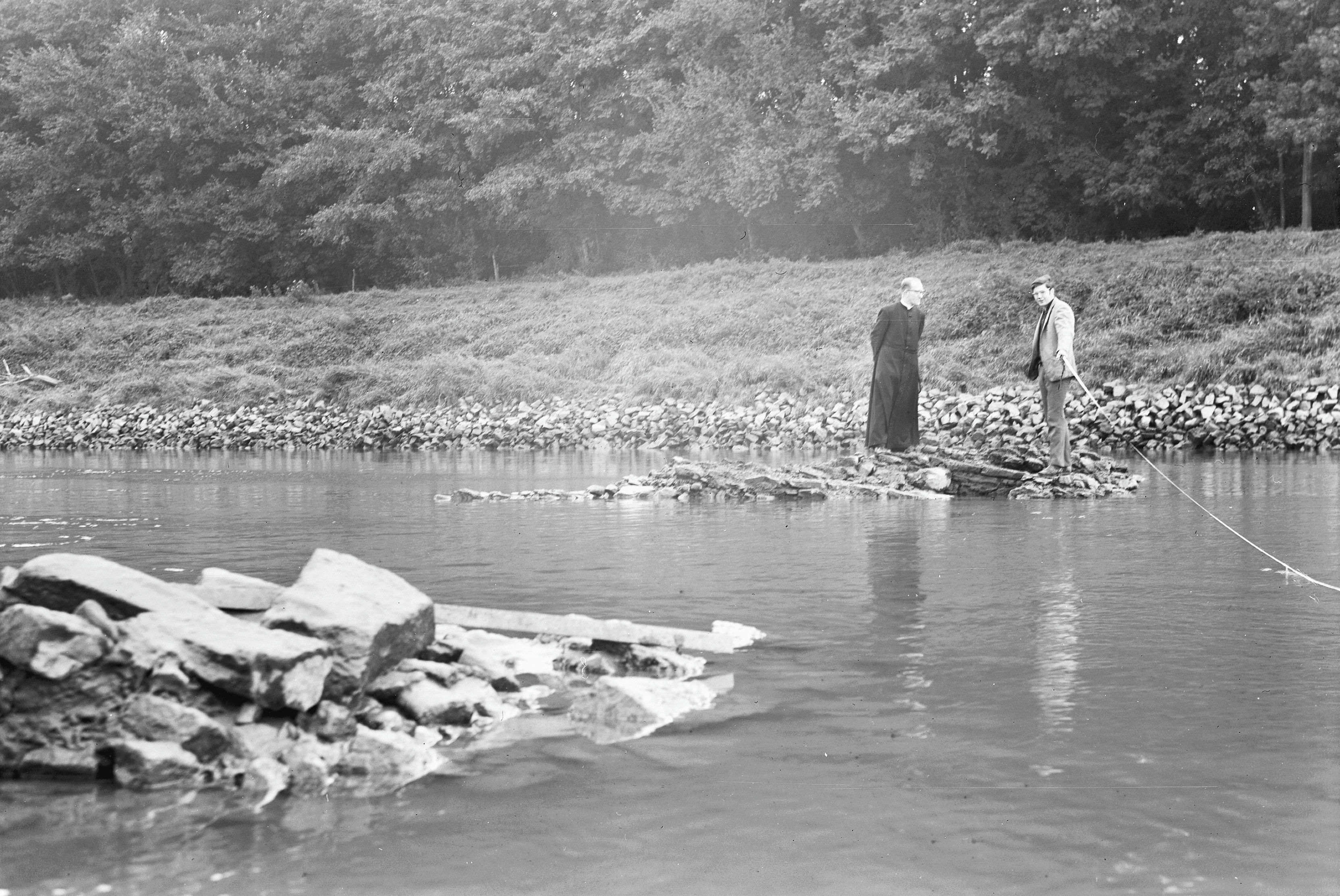 Kasteel: kasteelruïne in Maas, gezien naar Nederlands oever